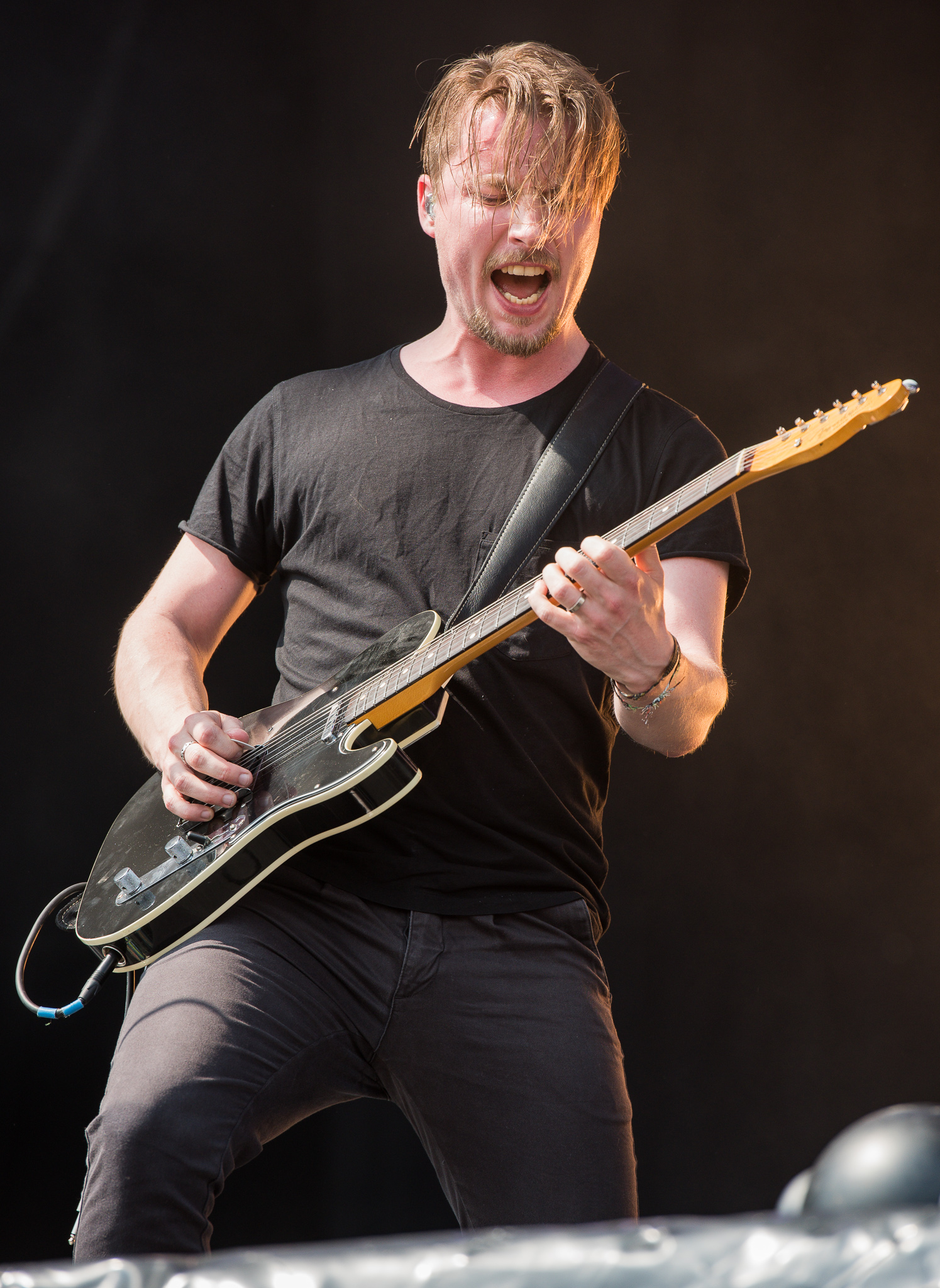 ARGO-Konzerte,Festival,Hannes Irengård,Konzert,Livekonzert,Livemusik,Musik,RiP,Rock im Park 2015,Royal Republic,Seat Zeppelin Stage